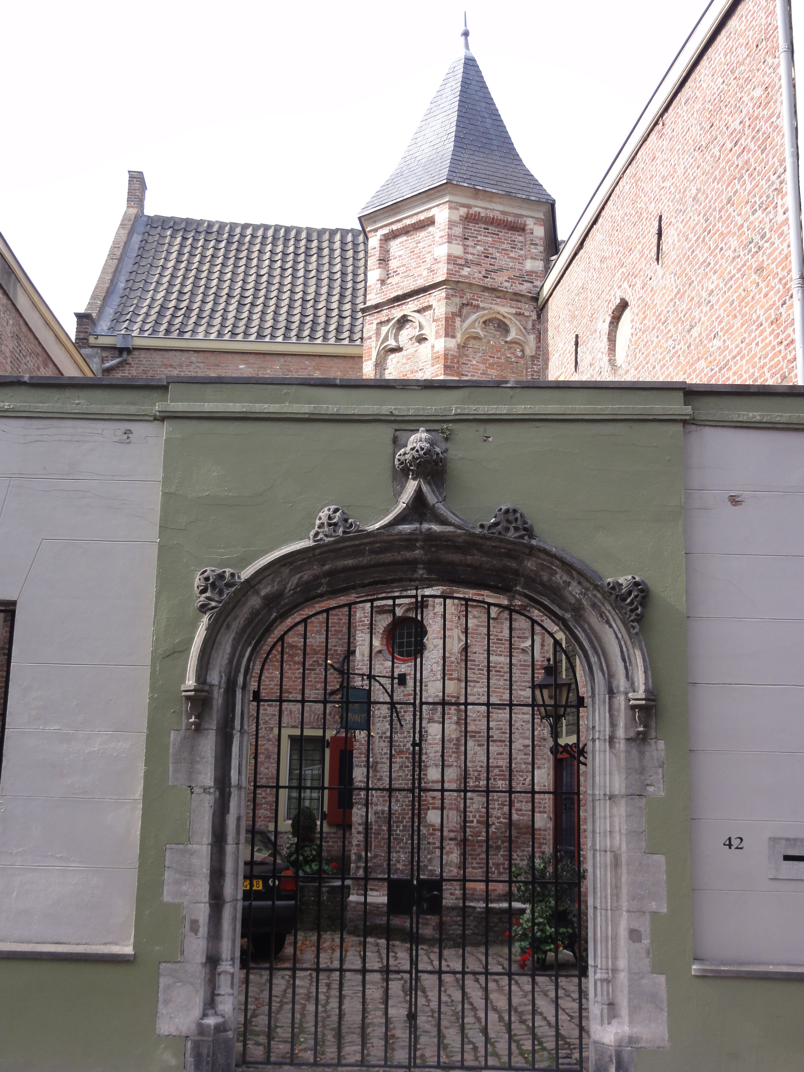 's-Hertogenbosch Rijksmonument 21809 Munt, Postelstraat 42, poort 53″ N, 5° 18′ 01.71″ E Object location51° 41′ 13.71″ N, 5° 18′ 01.77″ E